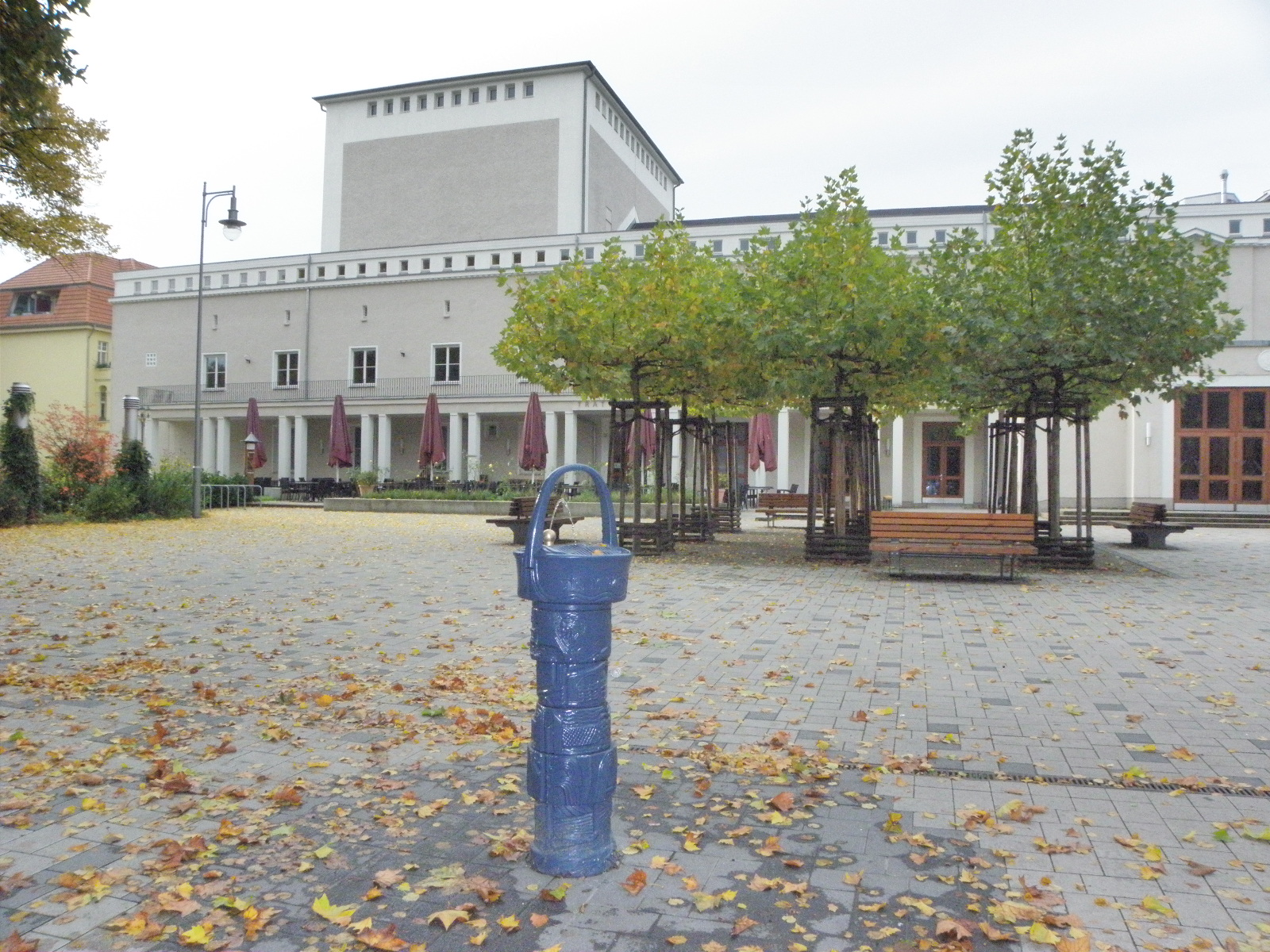 künftiger „Johannes-Fest-Platz“, z.Zt. der Aufnahme der namenlose Theater-Vorplatz. Im Vordergrund einer (neuer) Trinkwasserbrunnen.